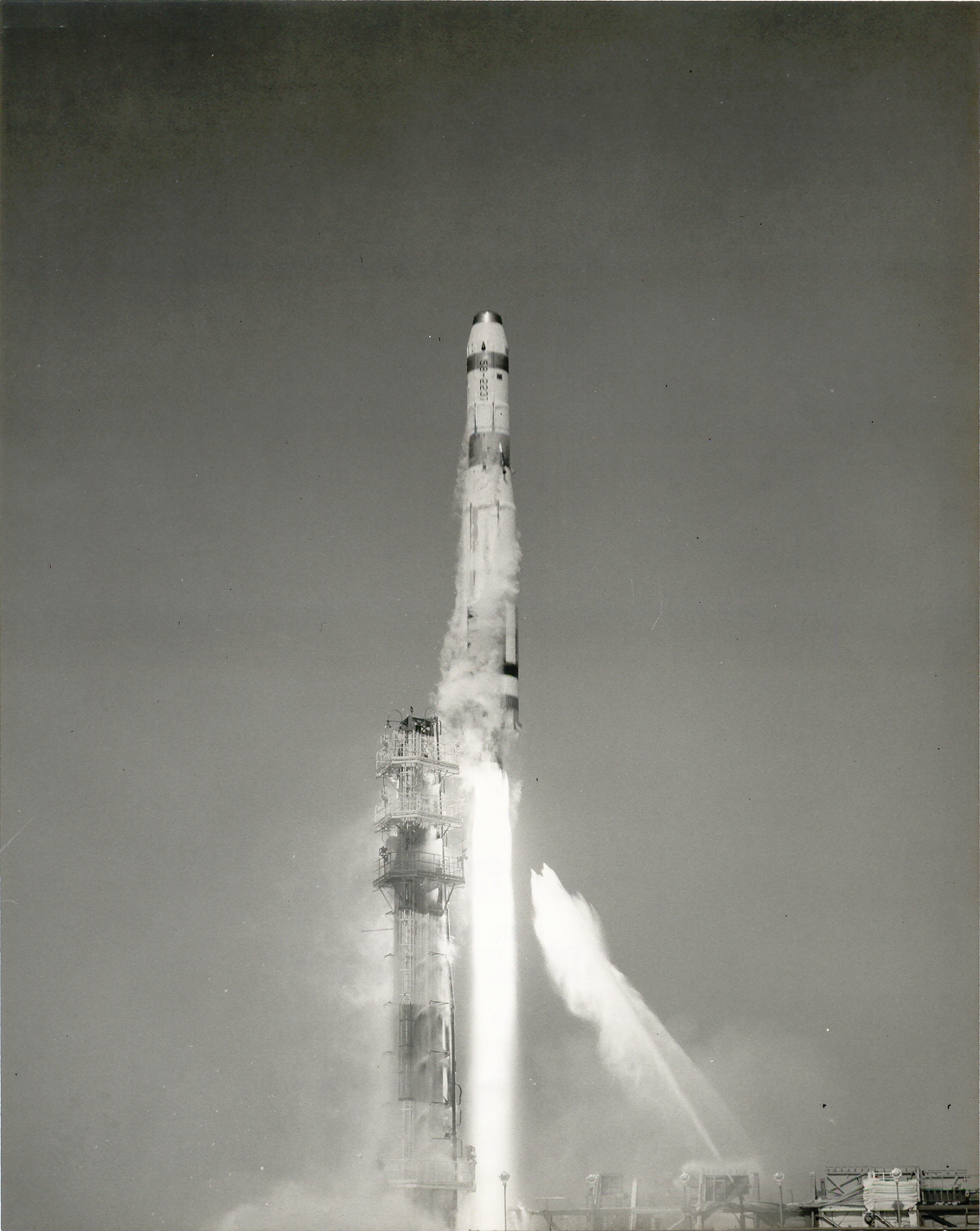 Titan I missile launch